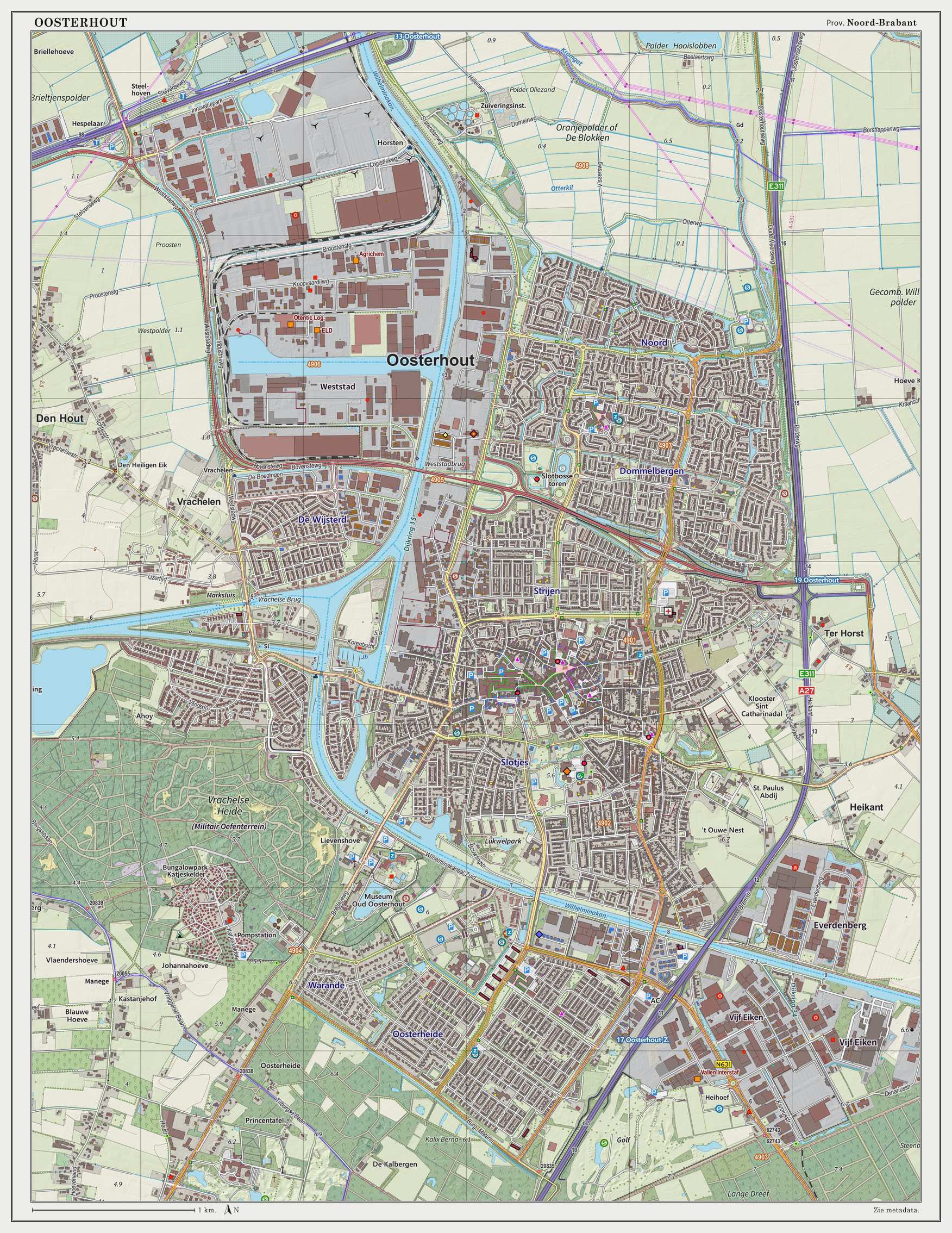 Topografische kaart van Oosterhout (woonplaats). Resolutie: 300 pixels/km. Kaartbeeld samengesteld uit de open geodata van de Top10NL en Top25namen (Basisregistratie Topografie, Kadaster), Creative Commons BY licentie. Gebouwvlakken uit open geodata BAG extract. Wegen uit de OpenStreetMap. Reliëfschaduw uit de Actuele Hoogtekaart AHN2. Samenstelling en kleurenschema: Jan-Willem van Aalst, met QGIS2. Zie ook de Legenda.